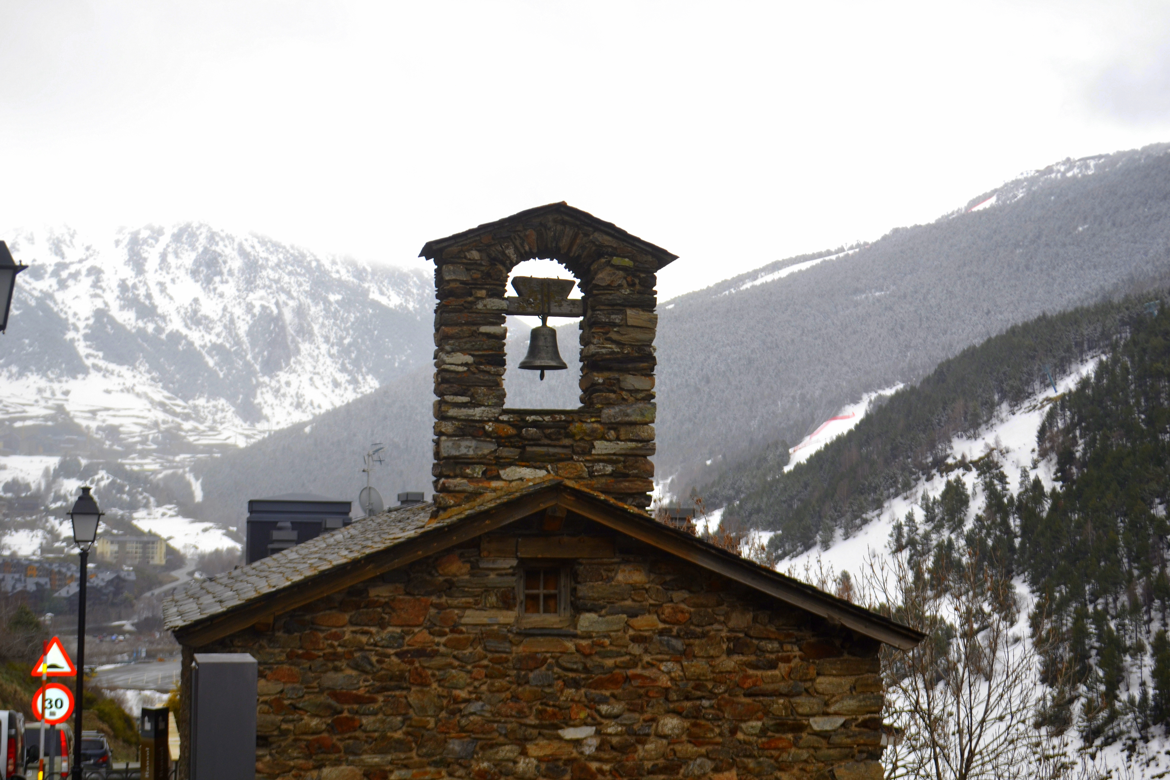 Vall de Ransol (Canillo) This is a a photo of a natural area in Andorra with id: AD-VCVR